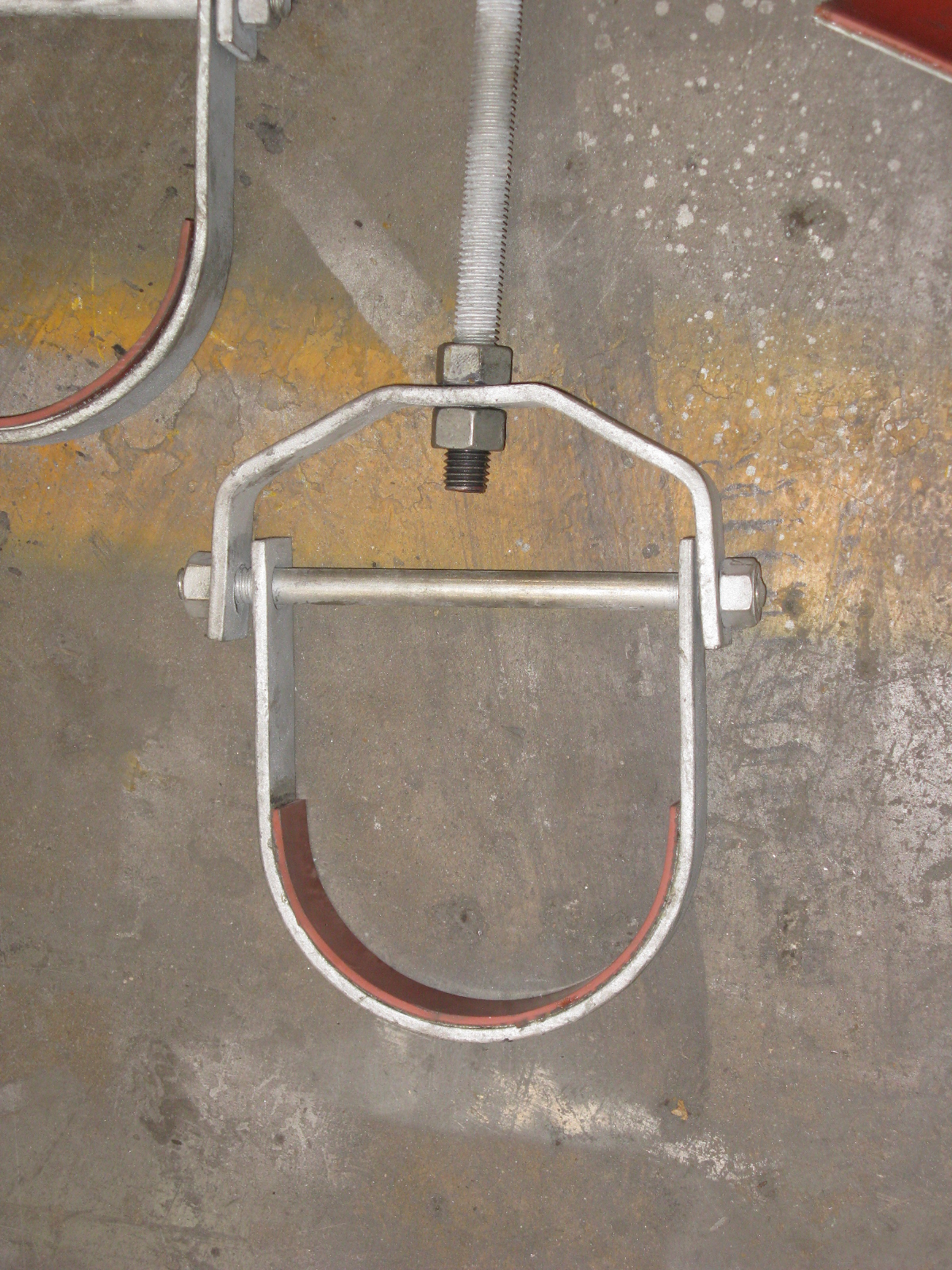 Clevis hanger